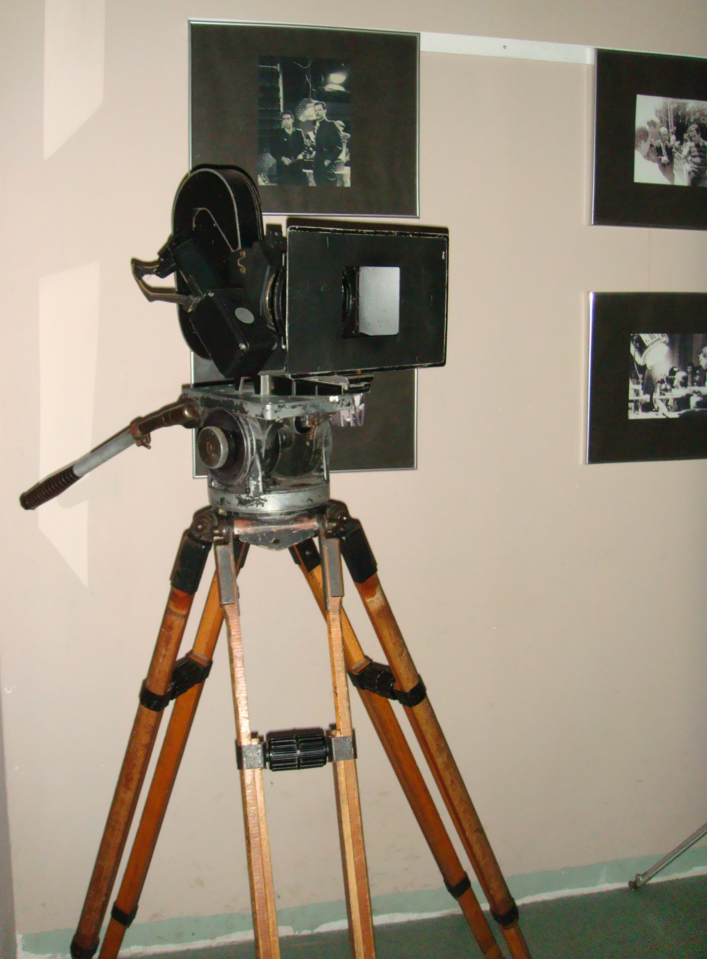 Одесский музей кино. Предметы быта на столе Жеголова, записки, документы + камера и осветительная техника, которые принимали участие в съемках фильма "Место встречи изменить нельзя". Съёмочный павильон №5.